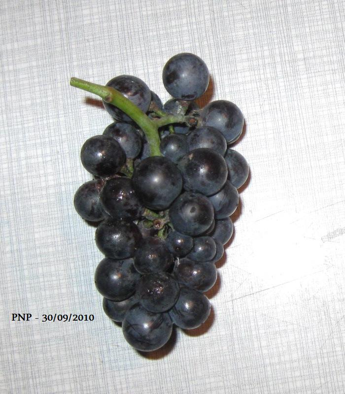 Pinot Noir Precoce - grono